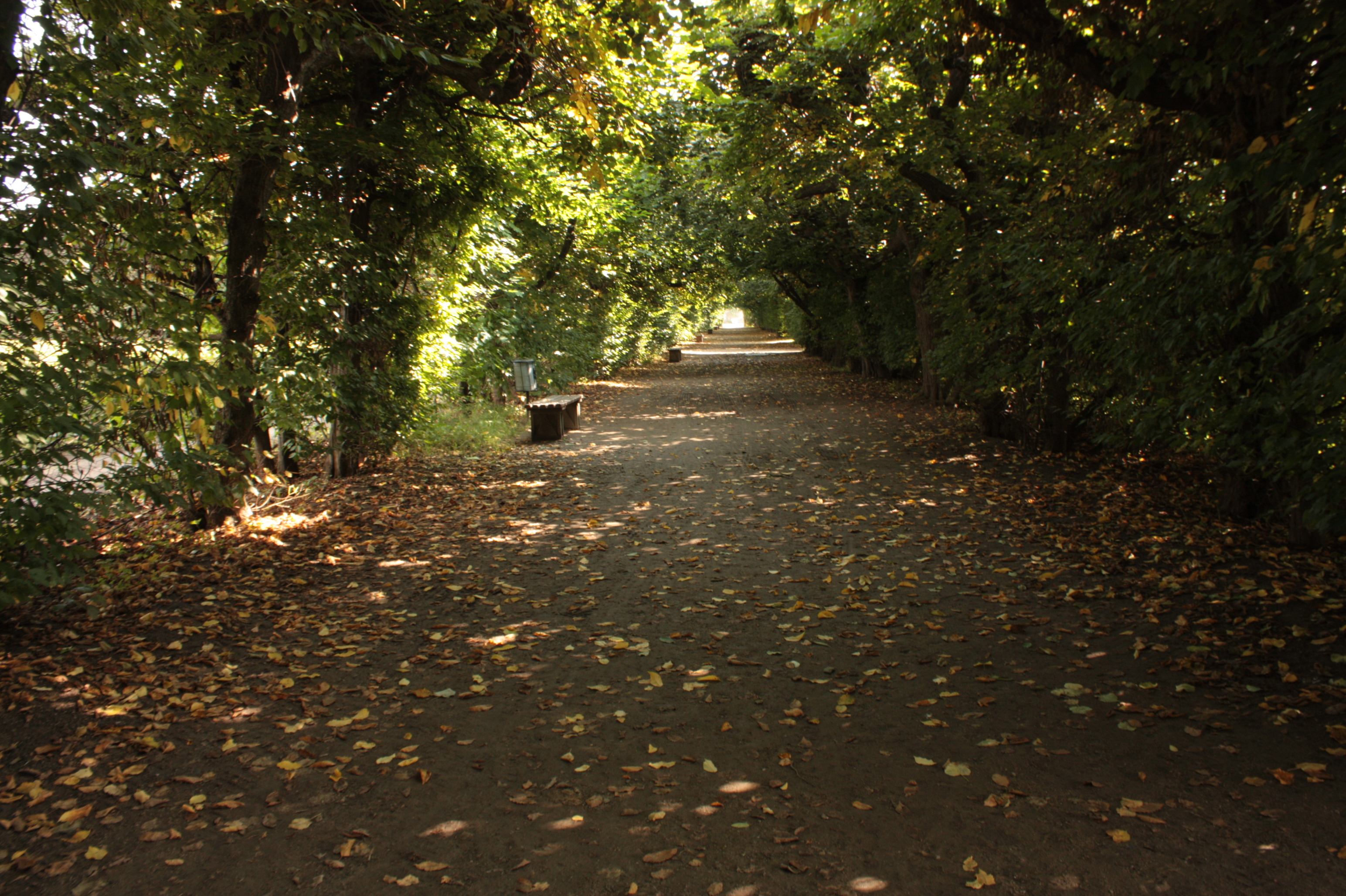 Živý plot , loubí, Kroměříž, Květná zahrada